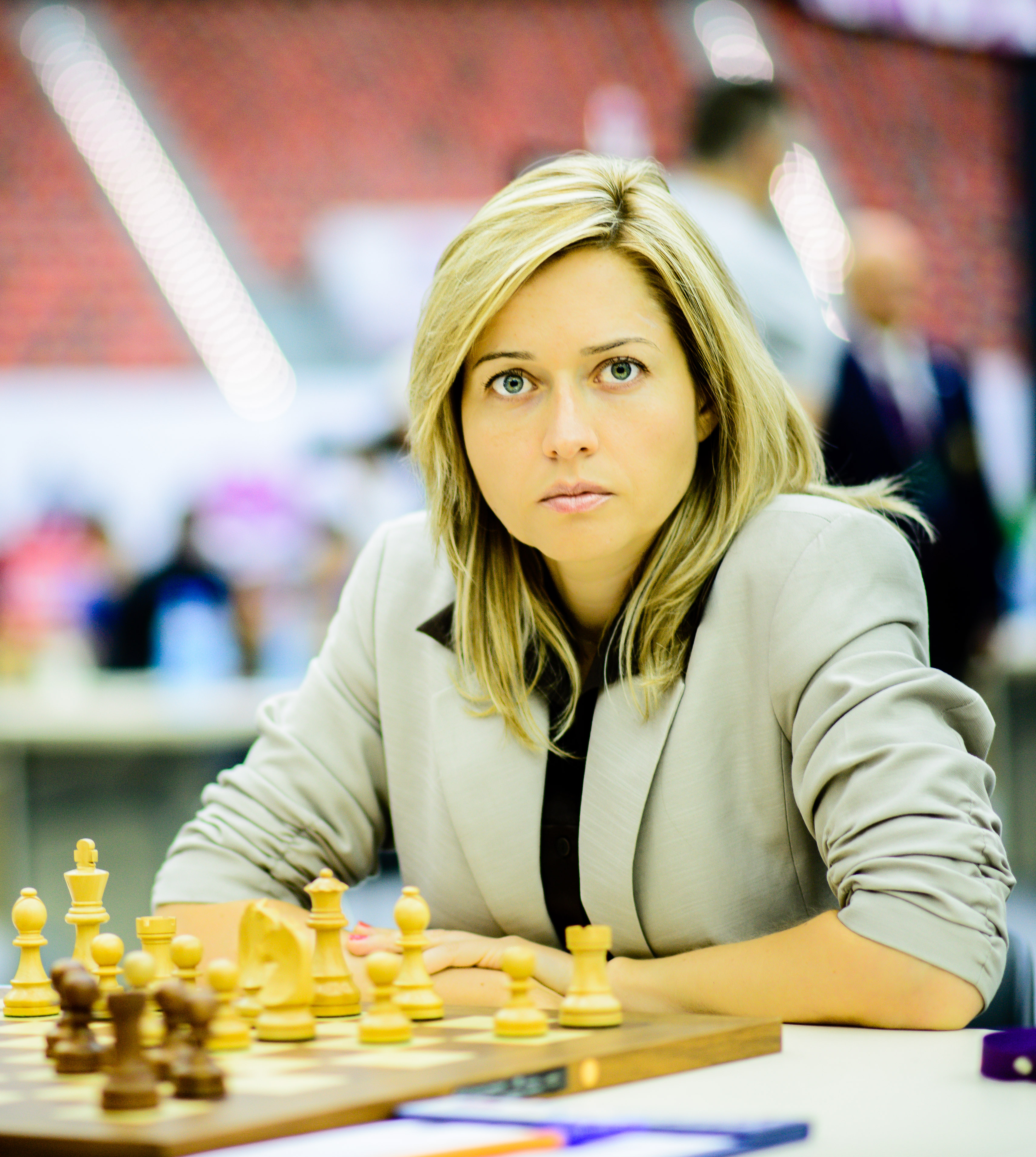 Zhukova Natalia